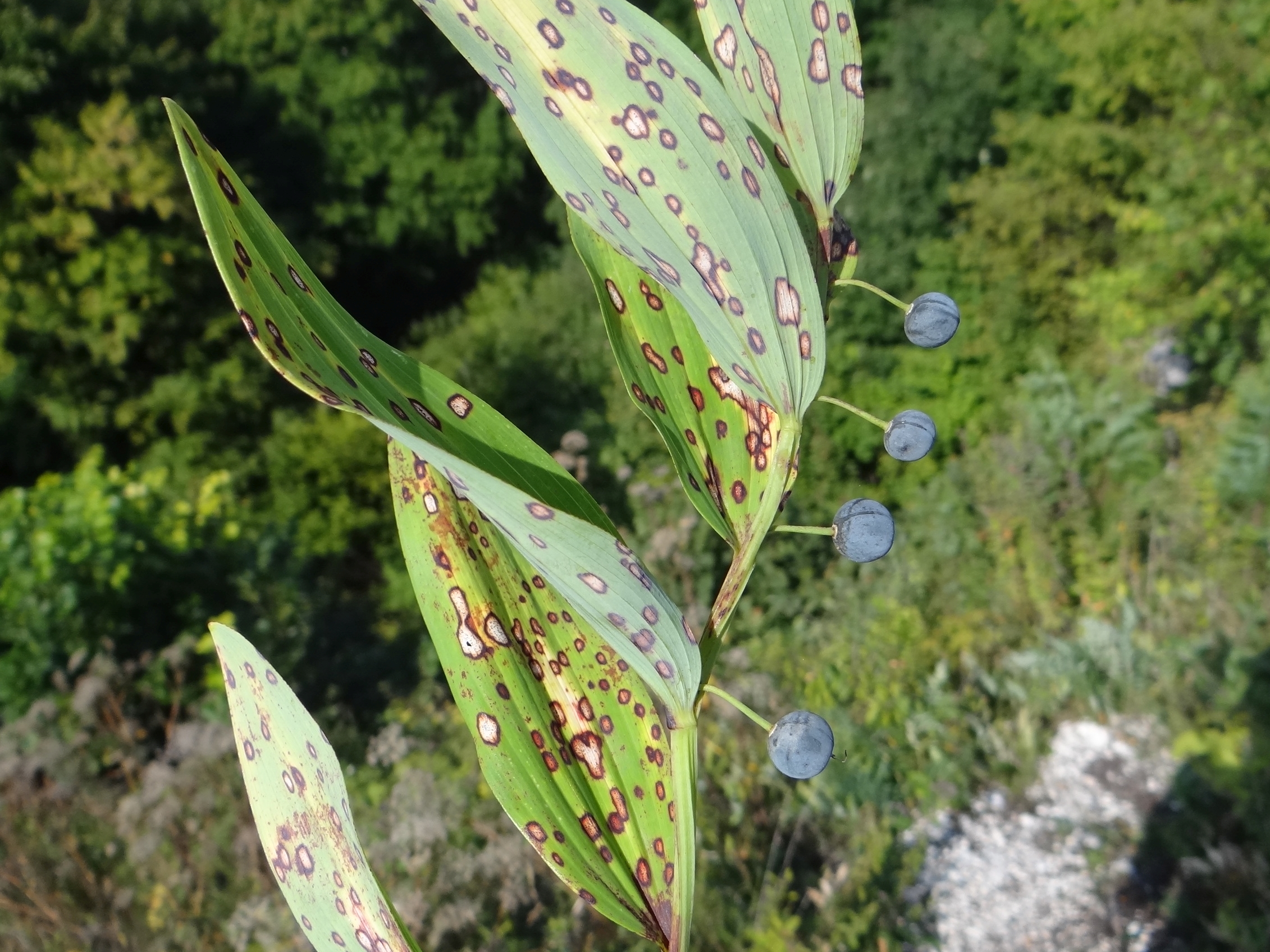 Phyllosticta cruenta on Polygonatum odoratum. Location: Poland, Ryczów, woj. śląskie) (Łysa Pałka)